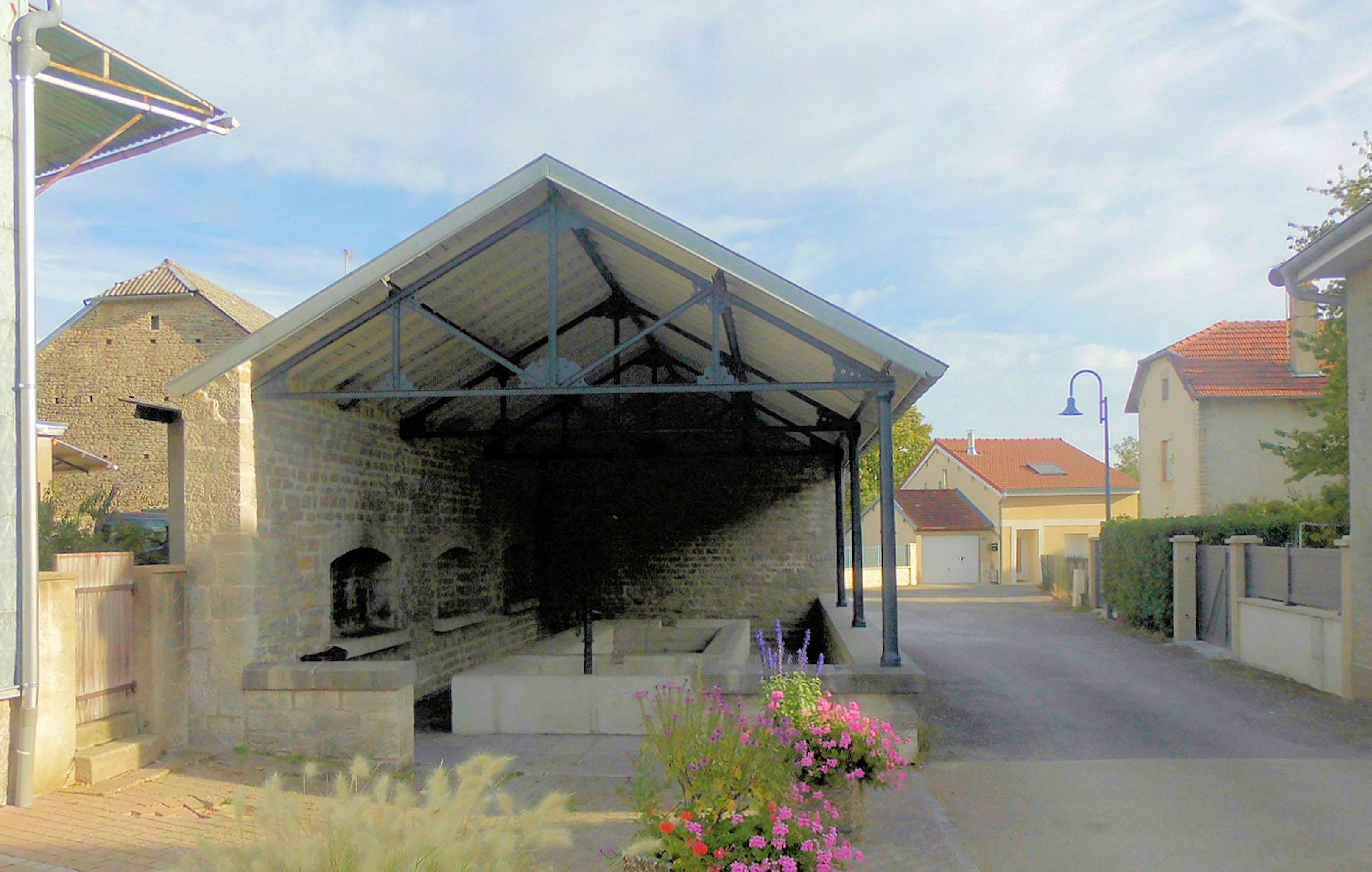 Lavoir de Pusey